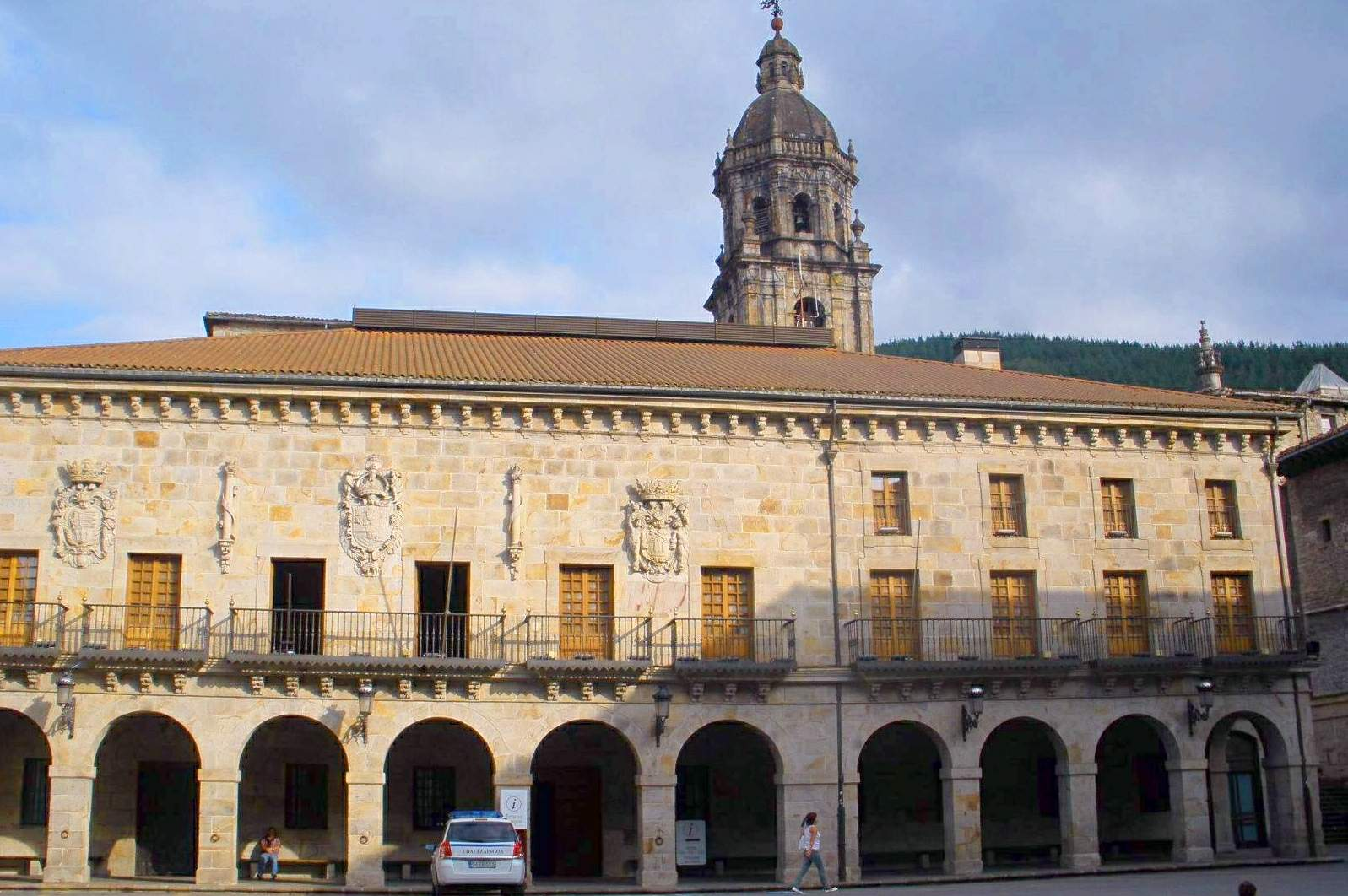 Bergara - Ayuntamiento